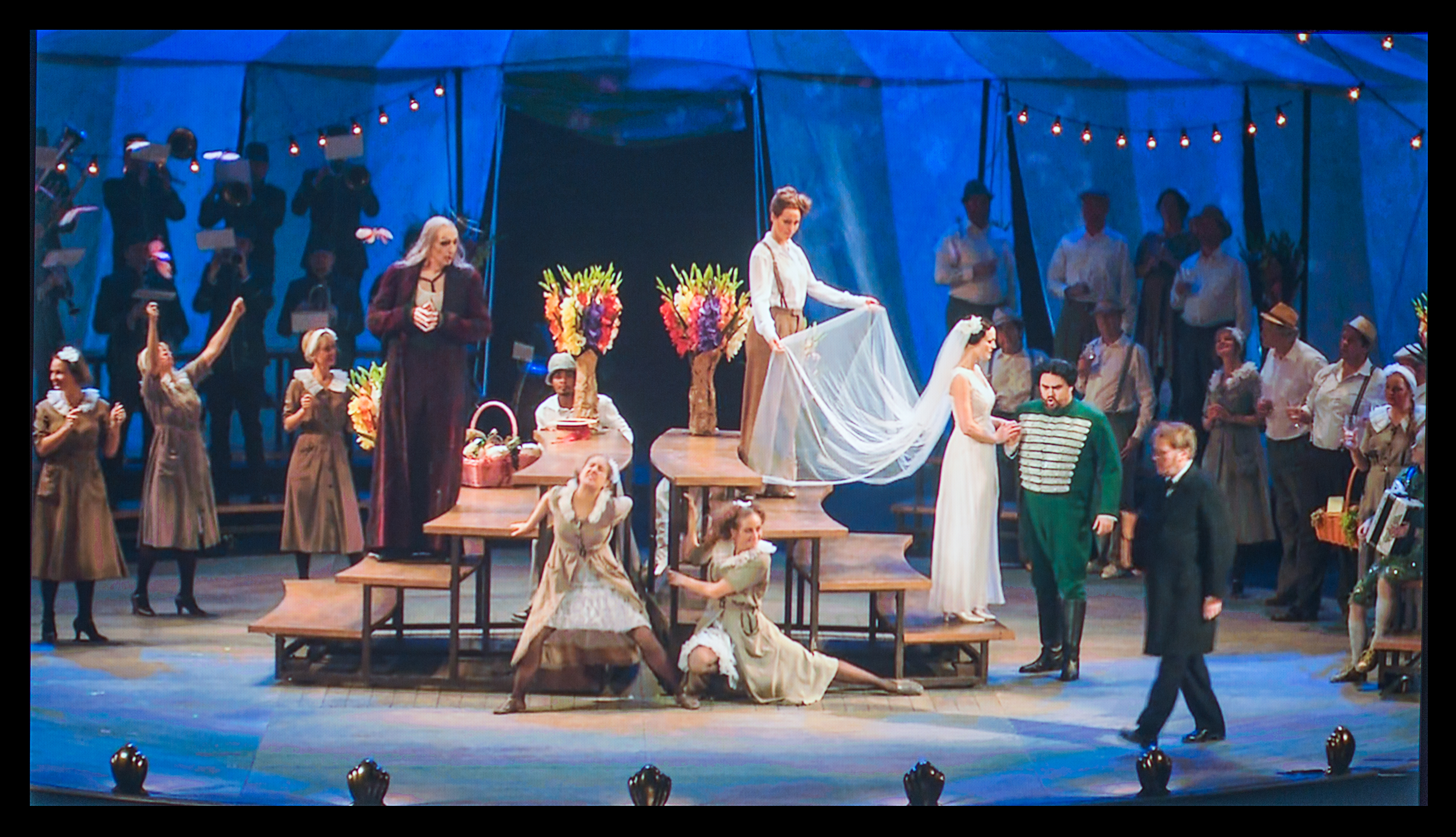 L'elisir d'amore, December 2013